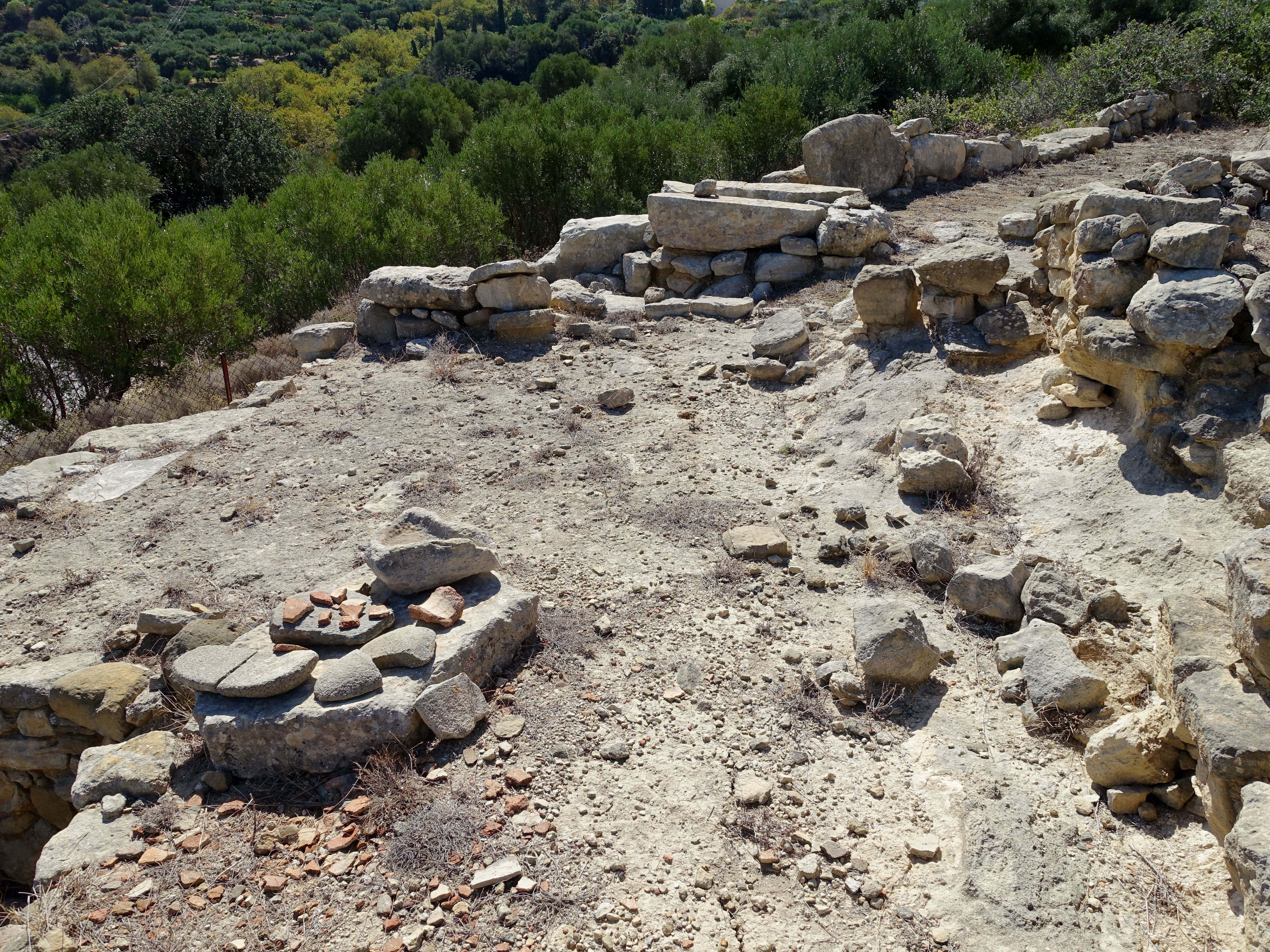 Minoische Villa von Zou (Ζου), Gemeinde Sitia, Kreta, Griechenland